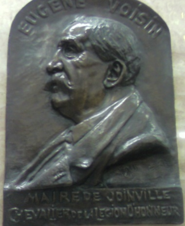 Eugène Voisin (1834-1914), buste en mairie de Joinville-le-Pont